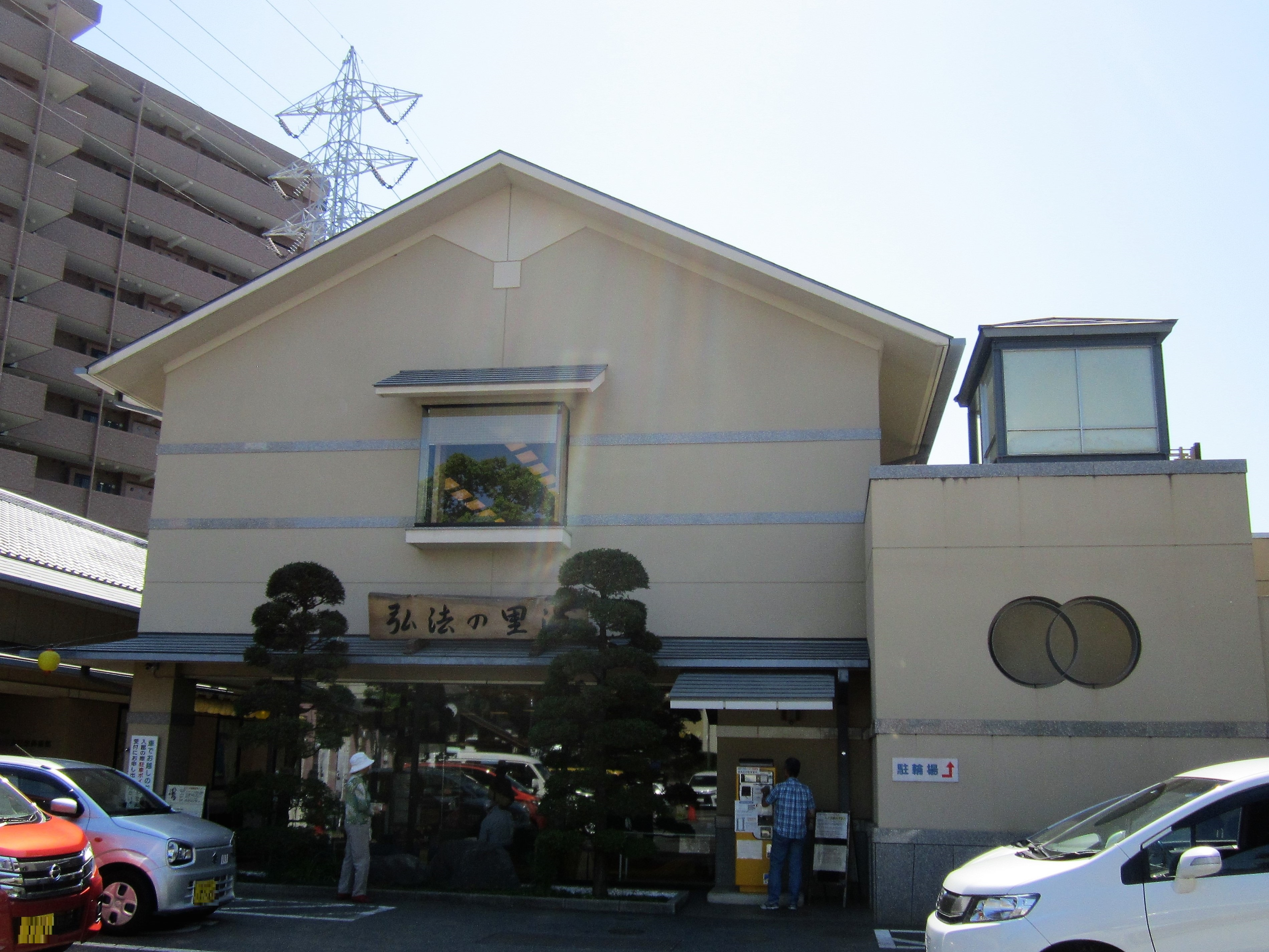 鶴巻温泉・弘法の里湯（秦野市鶴巻北） Canon PowerShot A2200